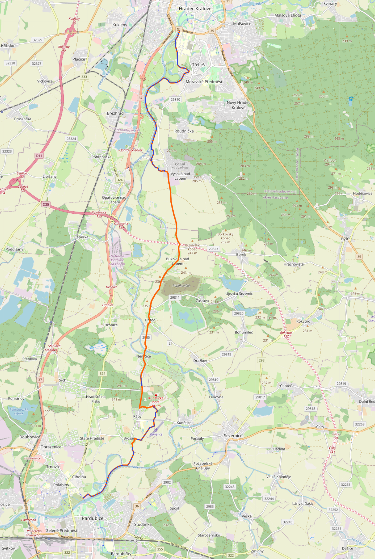 Mapa Hradubické cyklostezky v roce 2020. Modře jsou zvýrazněny hotové úseky, zbytek je veden po silnicích III. třídy. This map may be incomplete, and may contain errors. Don't rely solely on it for navigation.